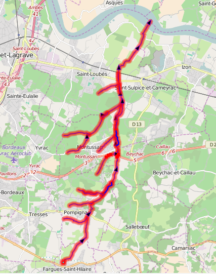 La Laurence (affluents) This map may be incomplete, and may contain errors. Don't rely solely on it for navigation.